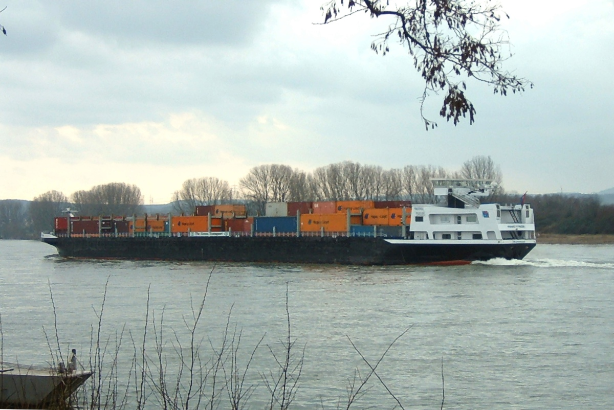 Containerschiff Amistade, Niederlande